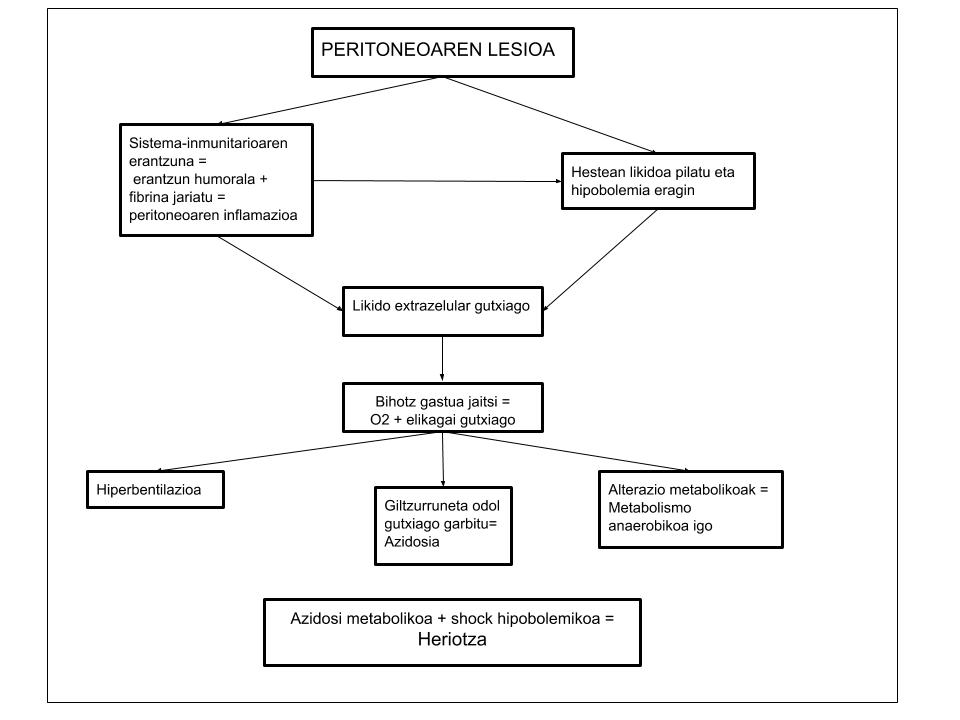 Peritonitis gaixotasunaren ondorioak eta organismoaren erantzunaren inguruko eskema